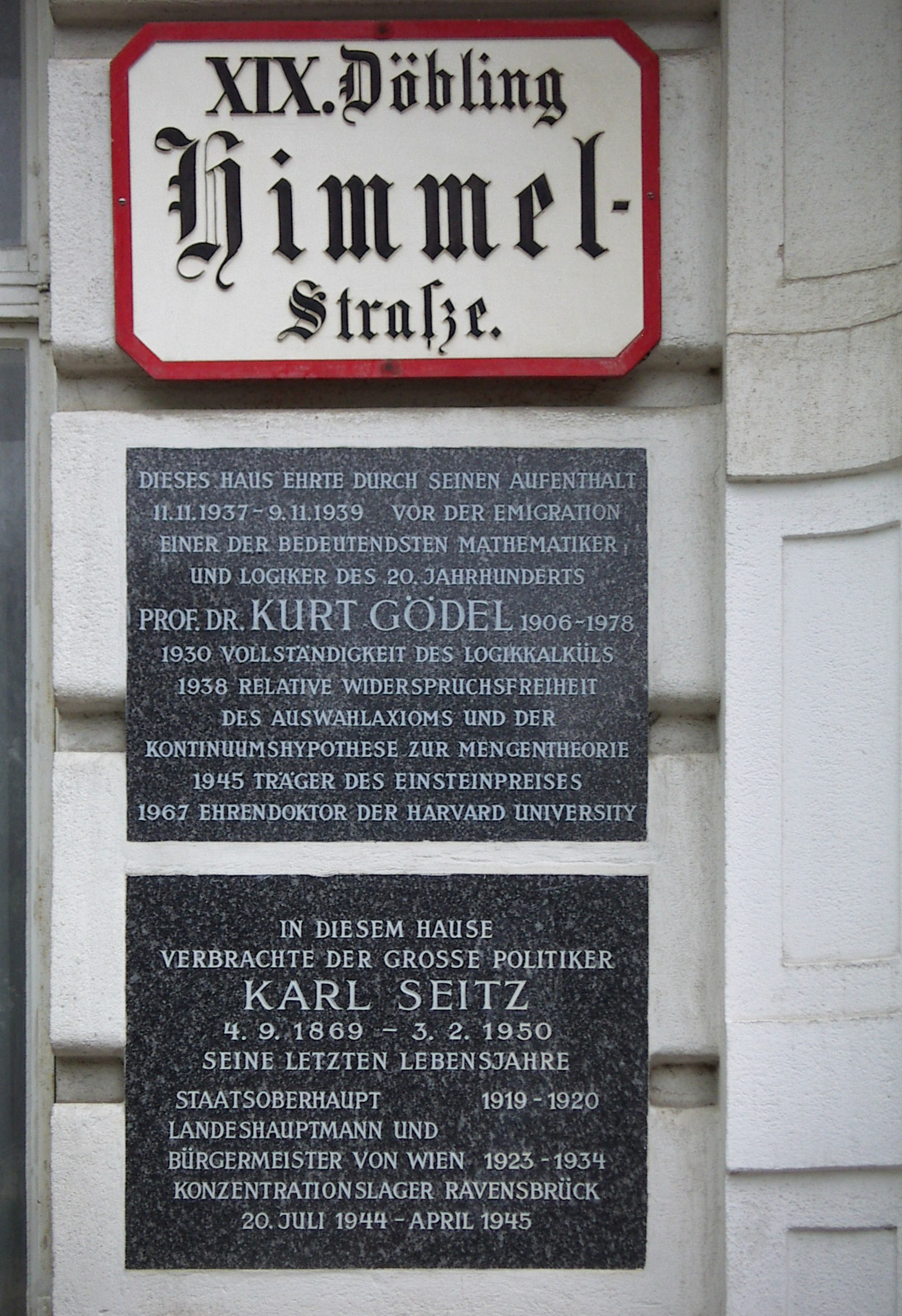 Gedenktafel, Kurt Gödel 1906-1978, Himmel-Str43, Vienna, Grinzing